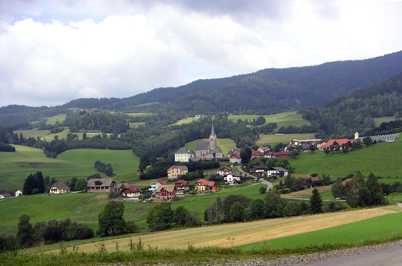 Zeltschach, nahe Friesach in Kärnten